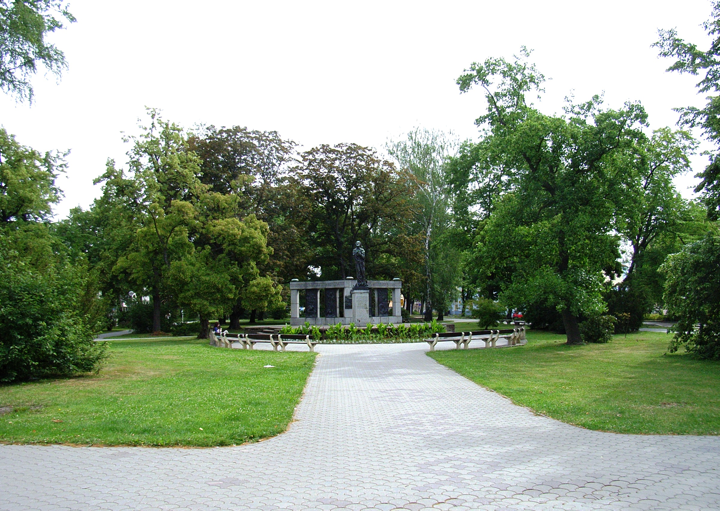 Česky: Husův park, pomník M.J.Husa od sochaře Fr.Bílka